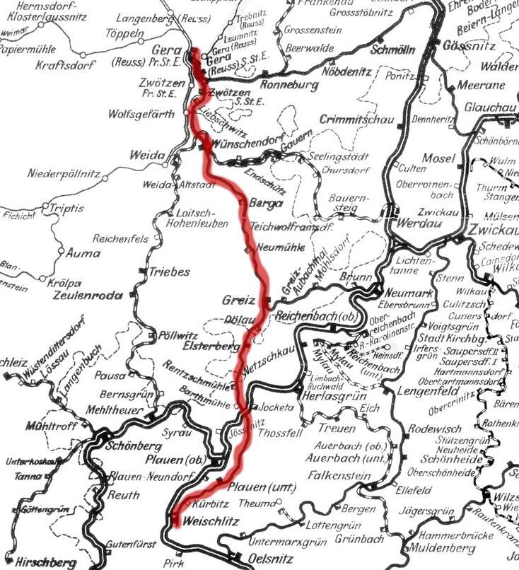 Lage der Elstertalbahn im sächsischen Eisenbahnnetz